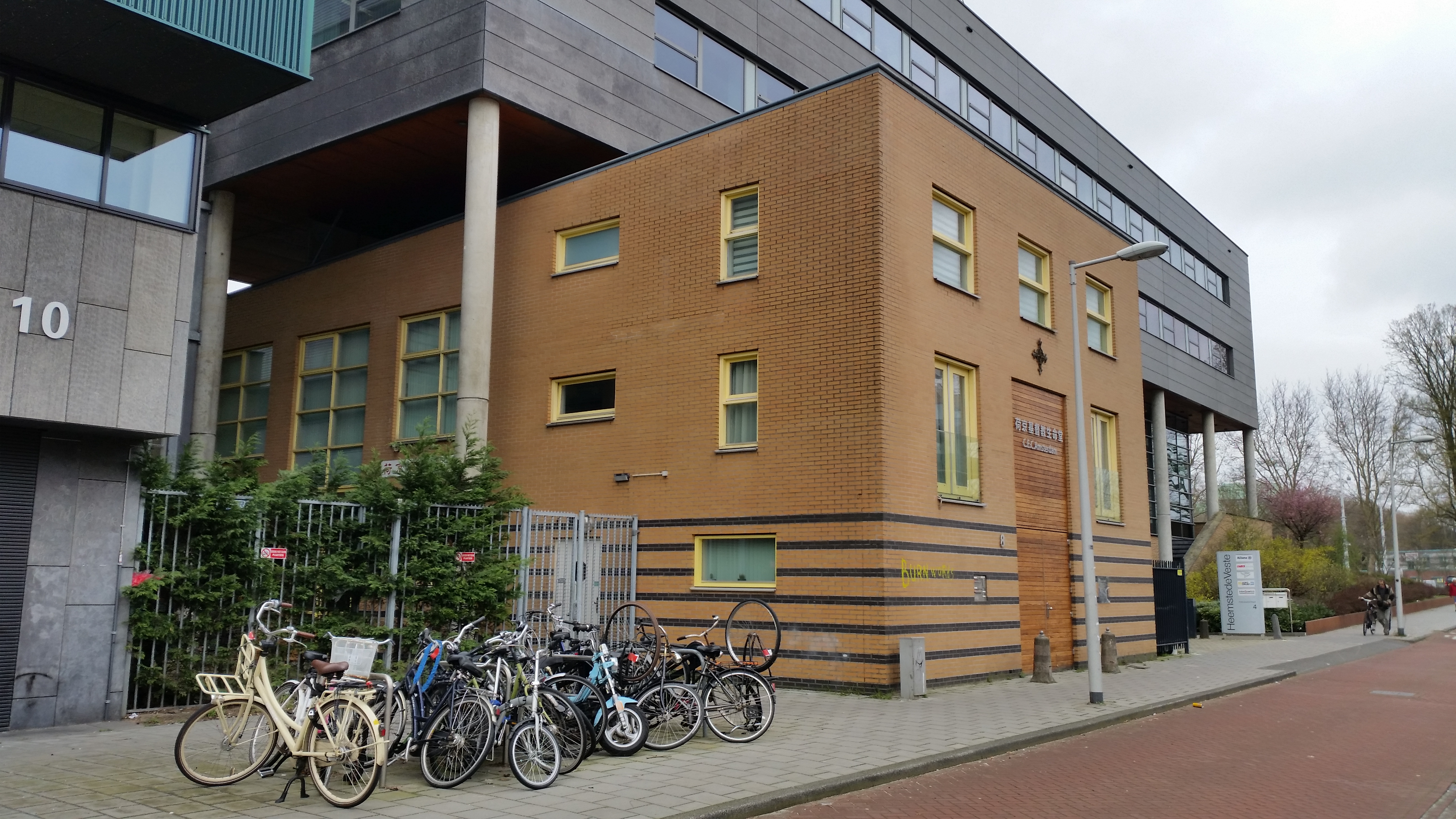 Kantoor is over de kerk op Poeldijkstraat 8, Amsterdam geen hebouwd